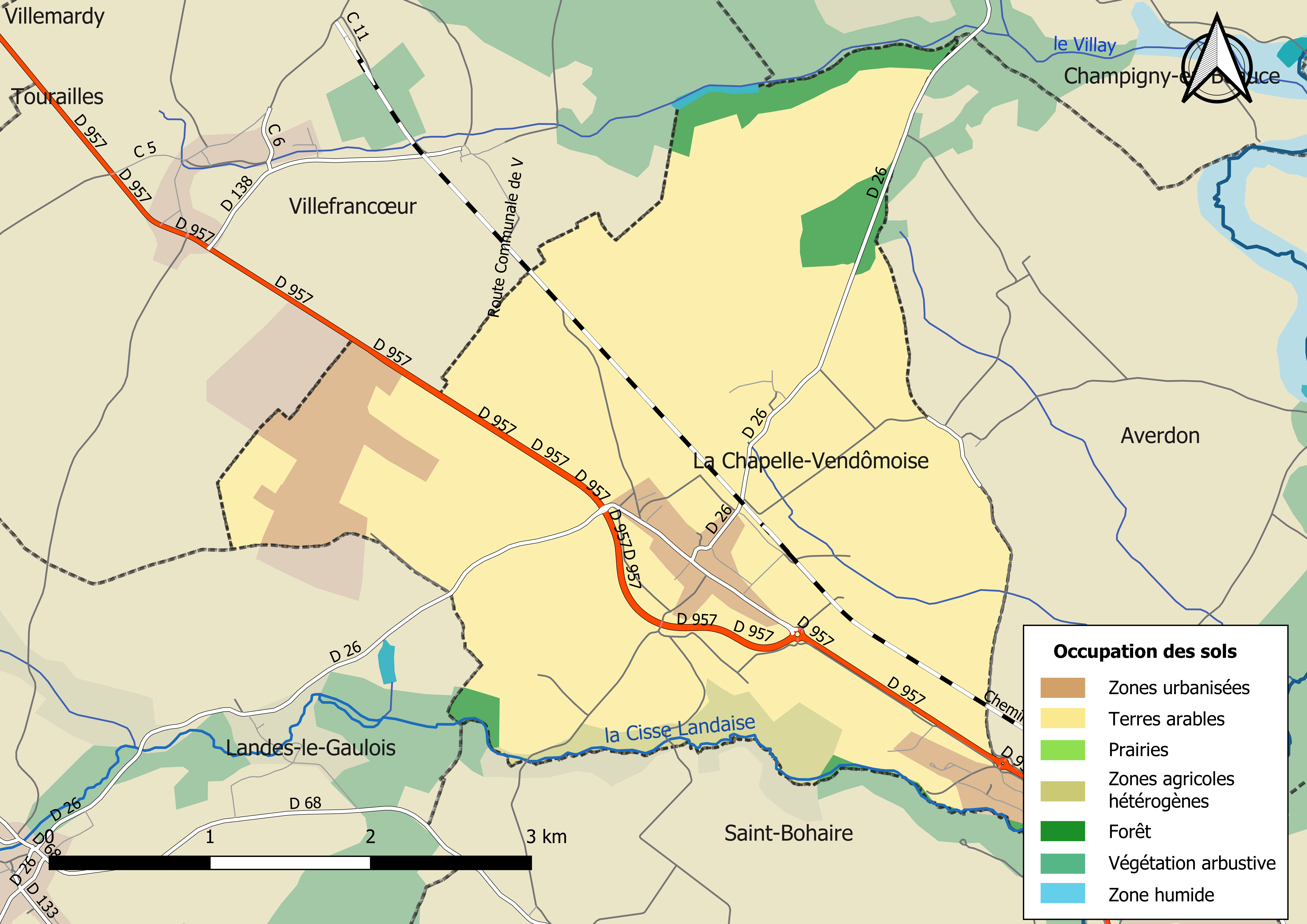 Carte des infrastructures et de l’occupation des sols en 2018 de la commune de La Chapelle-Vendômoise (France).